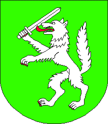 Escudo de Mõniste